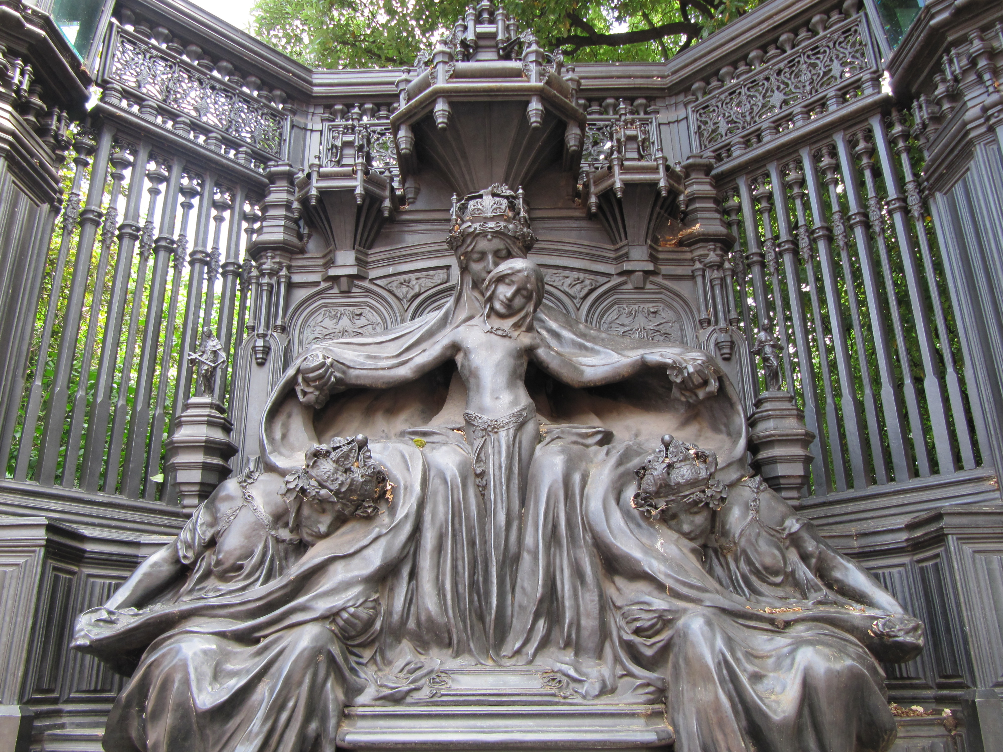 London